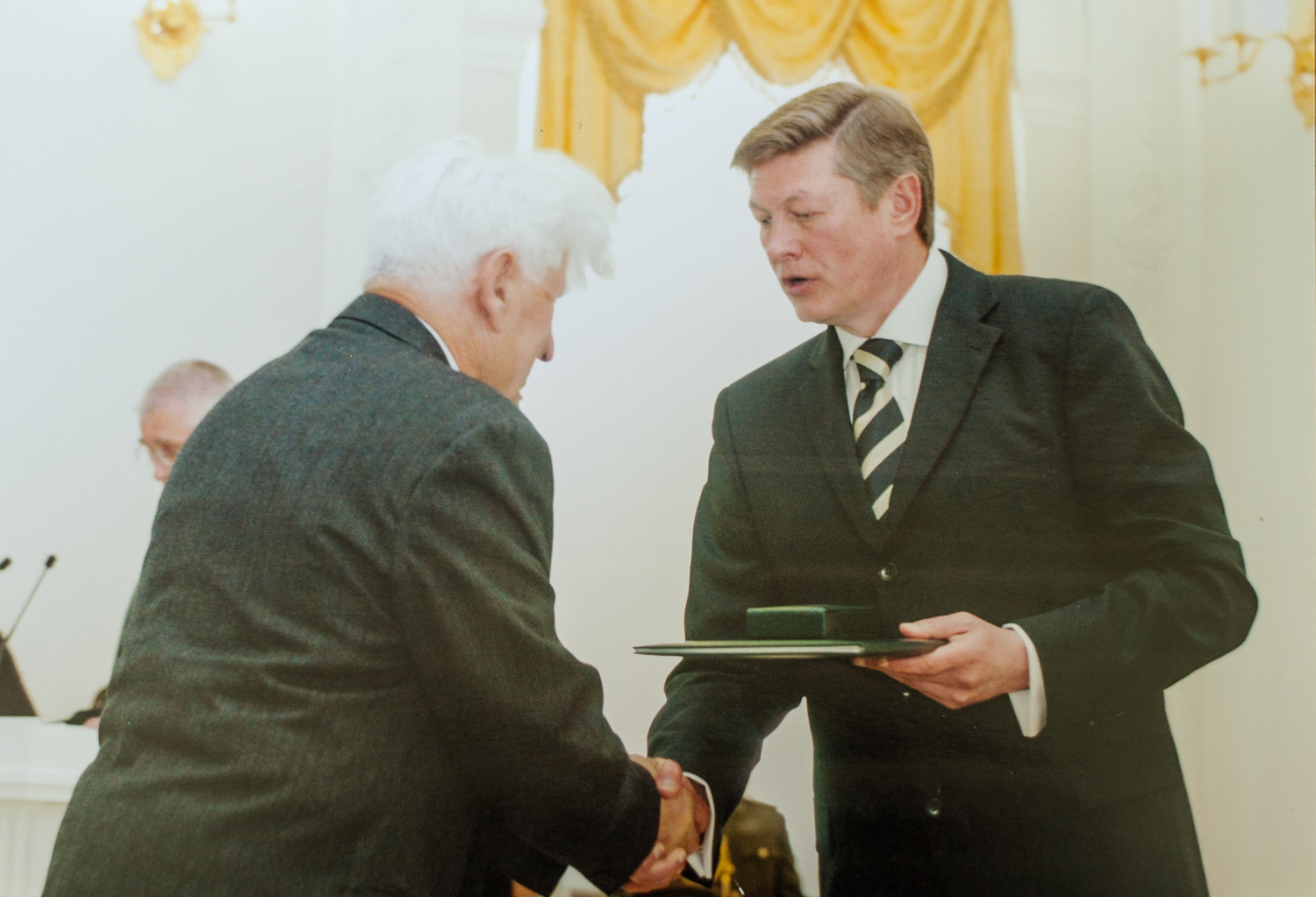 Президент Литвы Артурас Паулаускас вручает медаль Шукису Альгирдасу